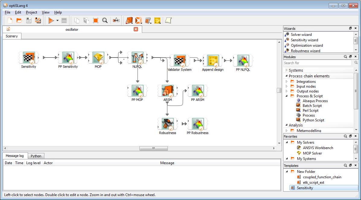 Programmscreenshot